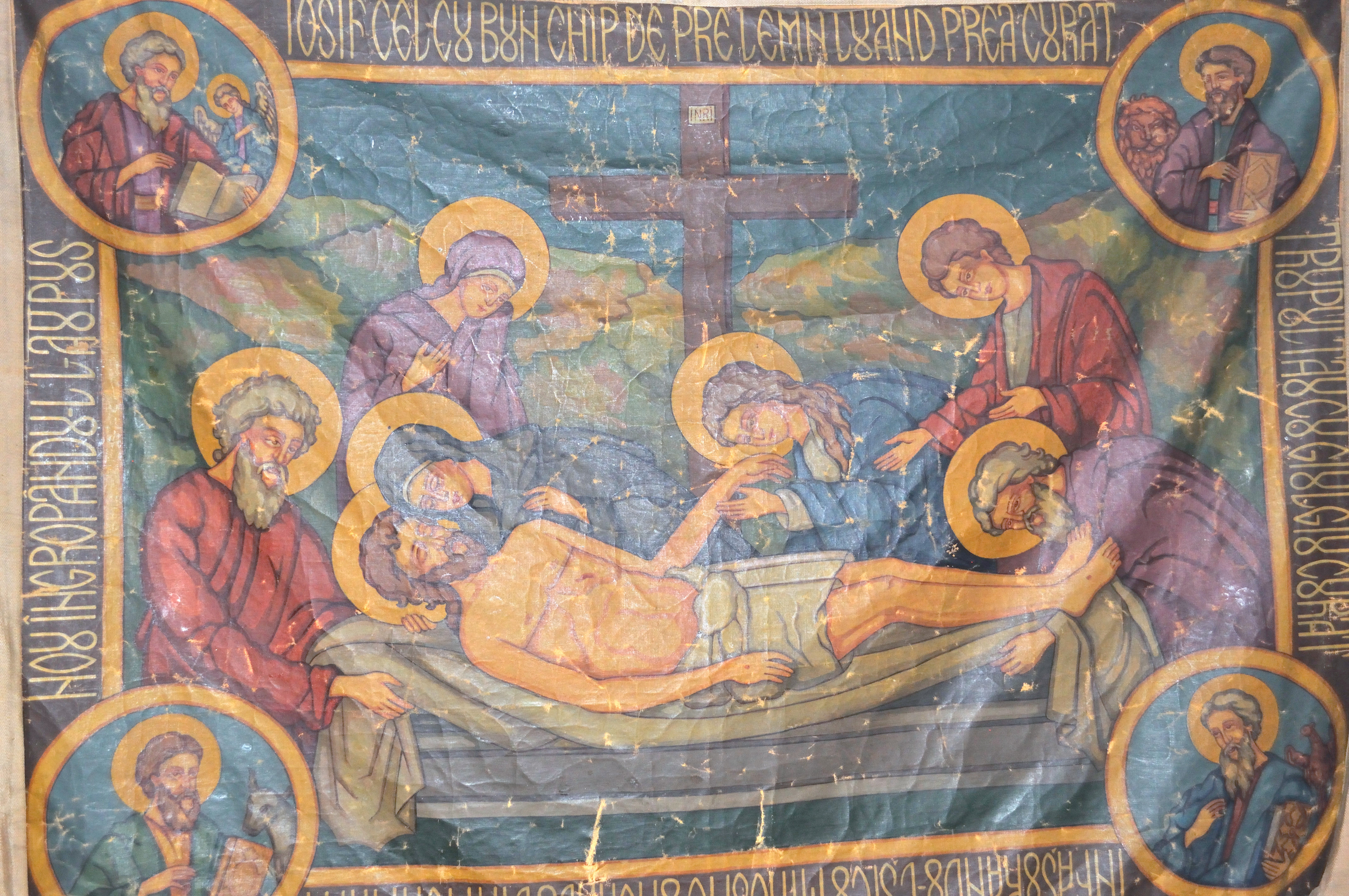 Biserica de lemn „Sfântul Nicolae” din Sulighete, județul Hunedoara